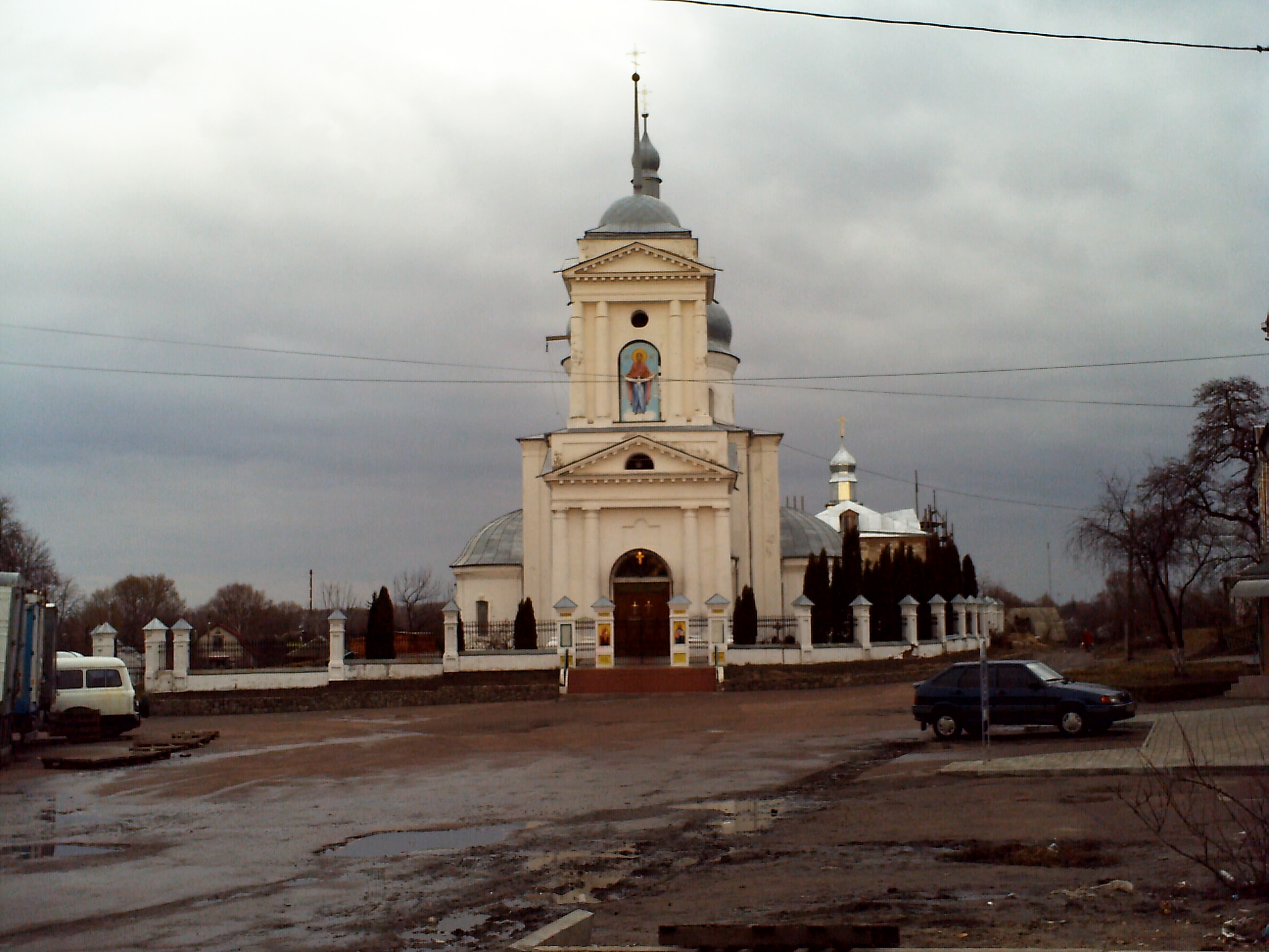 Покрова_Ніжин_весна_2008.jpg: Покровська церква Ніжин, Чернігівської області